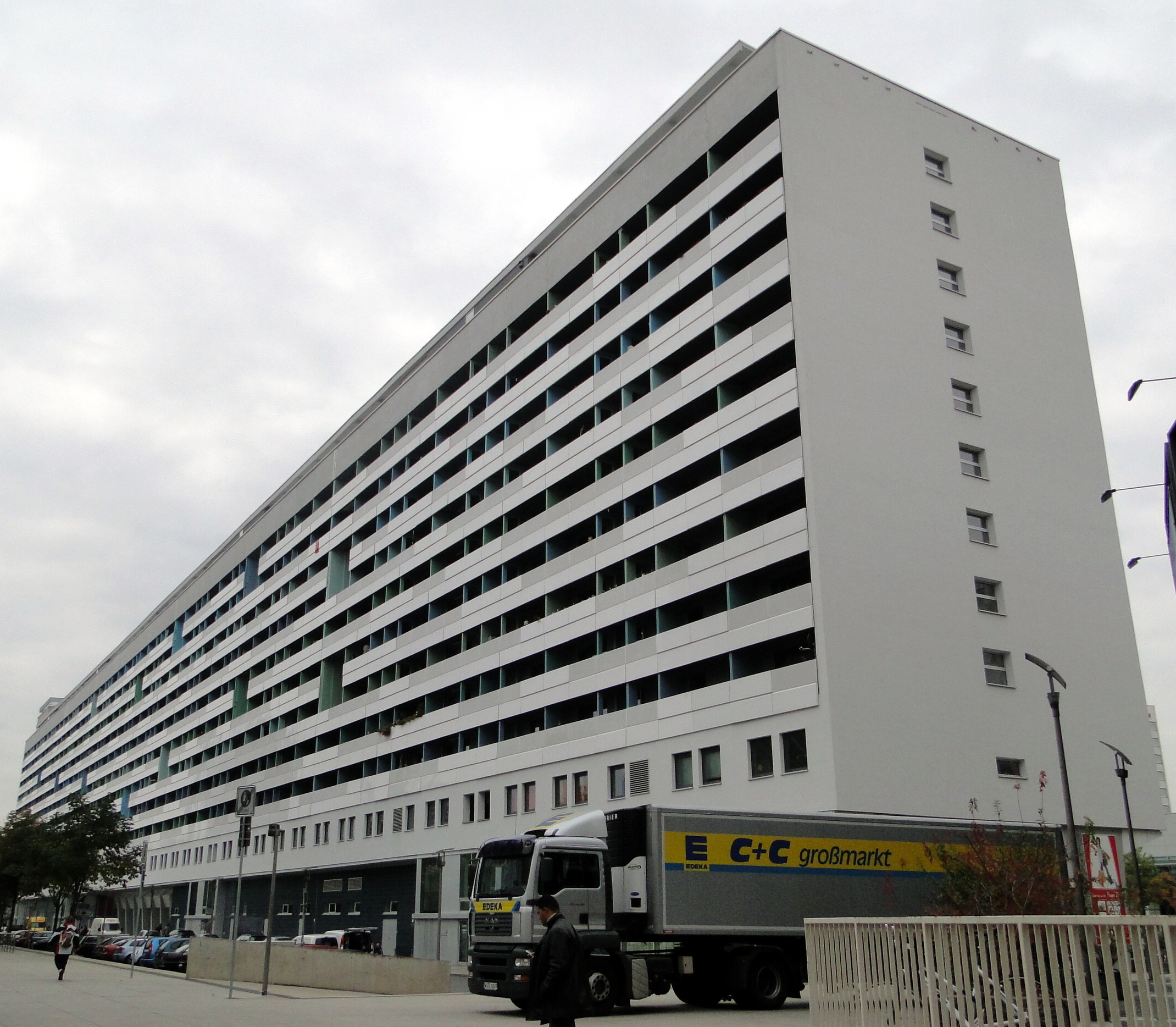 Prager Zeile, vom Rundkino aus aufgenommen